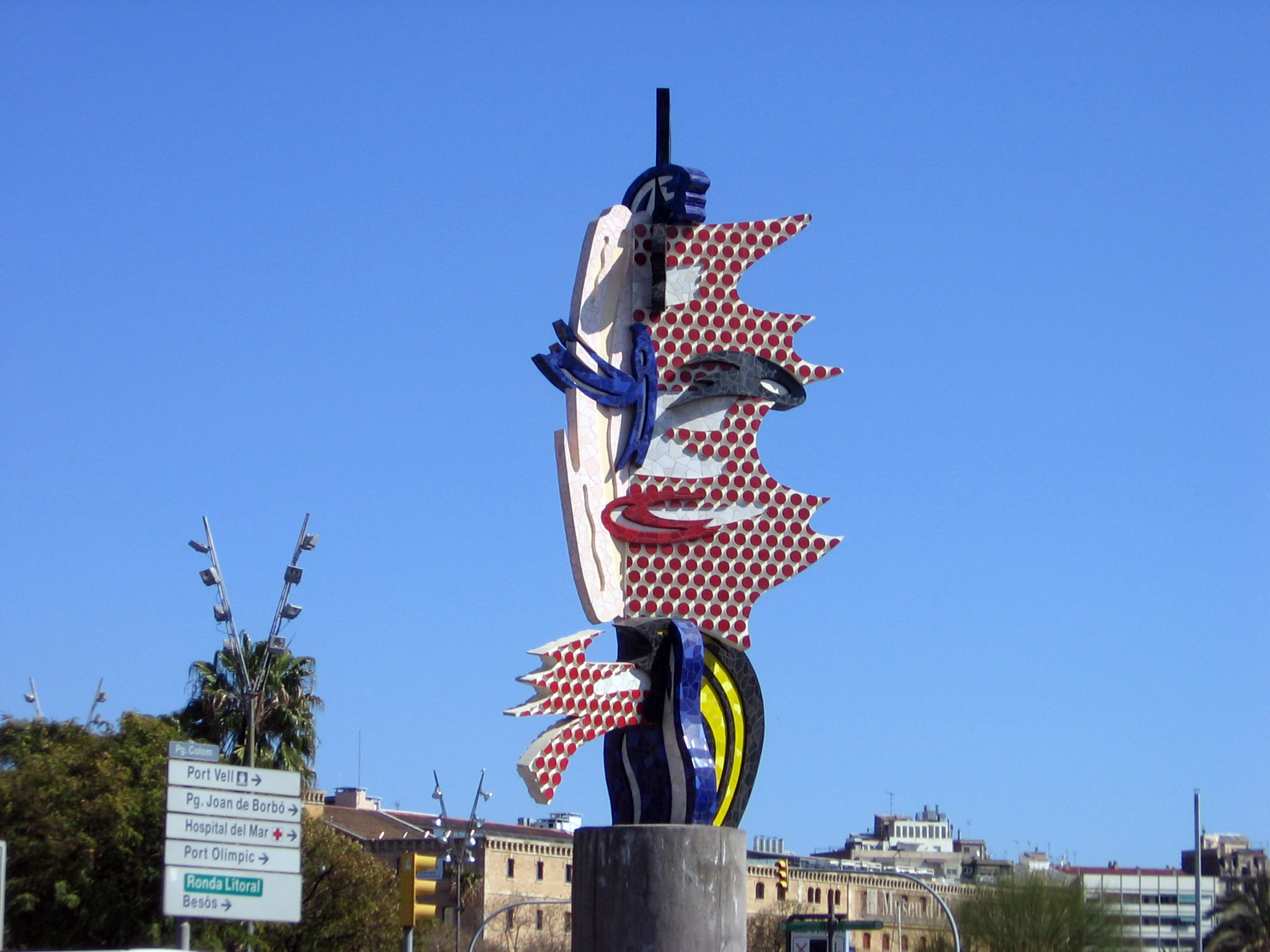 Barcelona's Head (1992), de Roy Lichtenstein, Muelle de Bosch i Alsina.